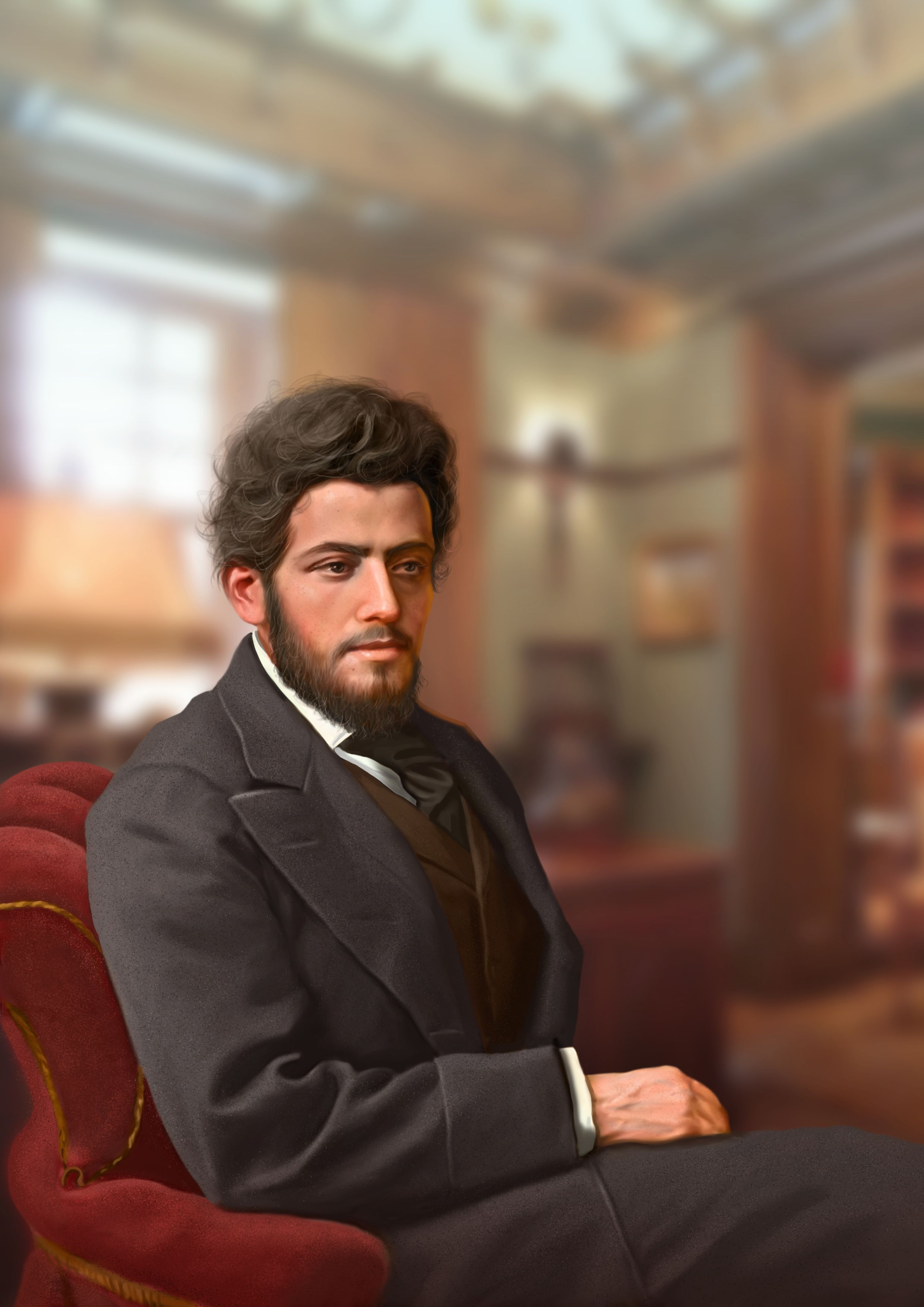 Пассовер Александр Яковлевич (портрет). Автор: Шишков Евгений Анатольевич